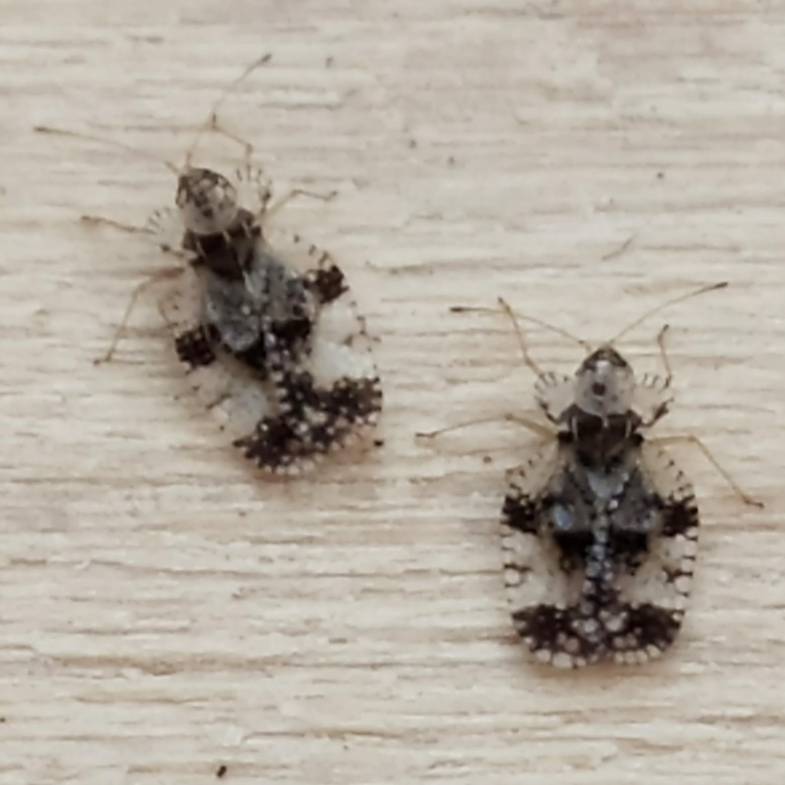 Tigres du poiriers trouvés sur un jeune poirier à Esvres-sur-Indre.